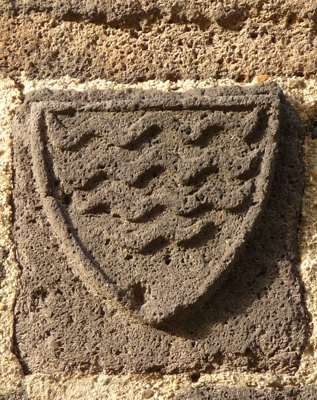 Blason sculpté sur une pierre des remparts de la ville d'Agde, Hérault, France